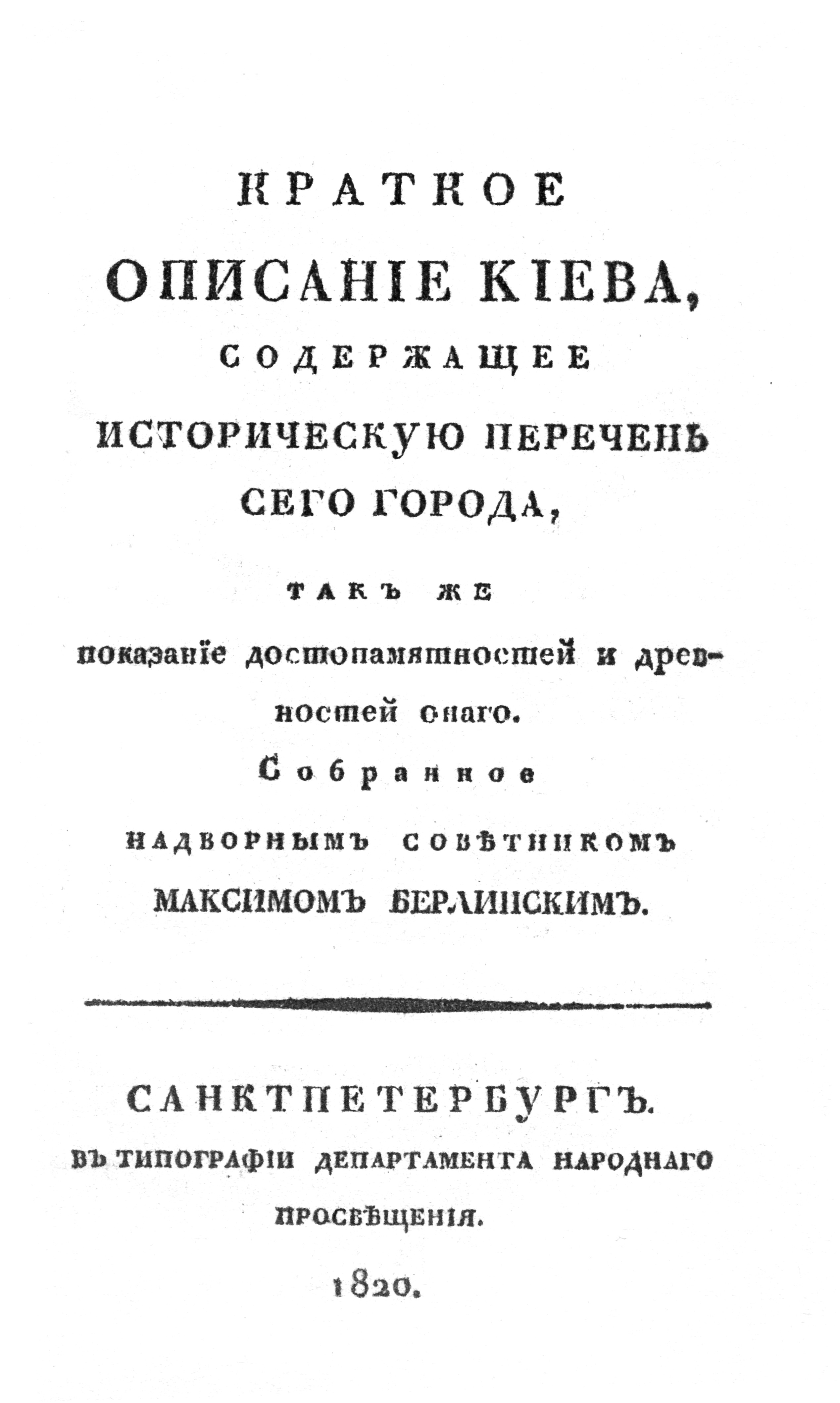 Берлинский М. Ф. Краткое описание Киева... (1820). Титульный лист